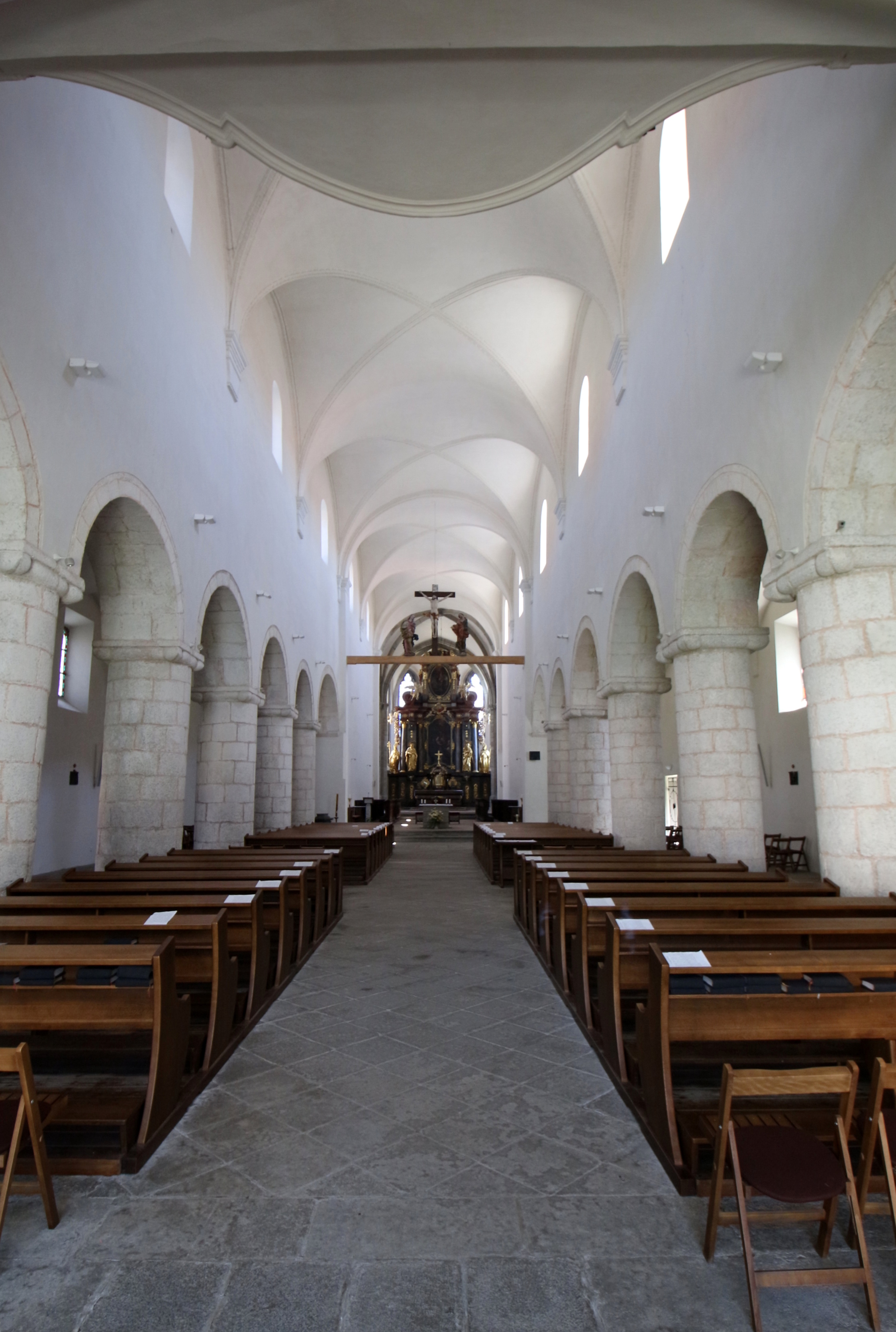 Klášterní bazilika Navštívení Panny Marie v Milevsku